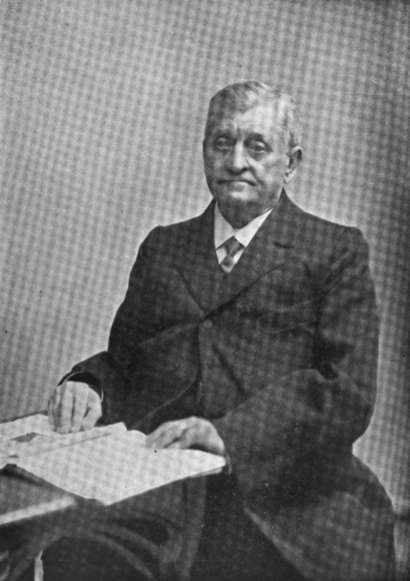 Hornjoserbsce: Jakub Kral (1828–1911); serbski wučer, domiznowědnik, a ludowy spisowaćel.